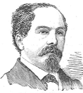 Ritratto del senatore Giacomo Giuseppe Alvisi.